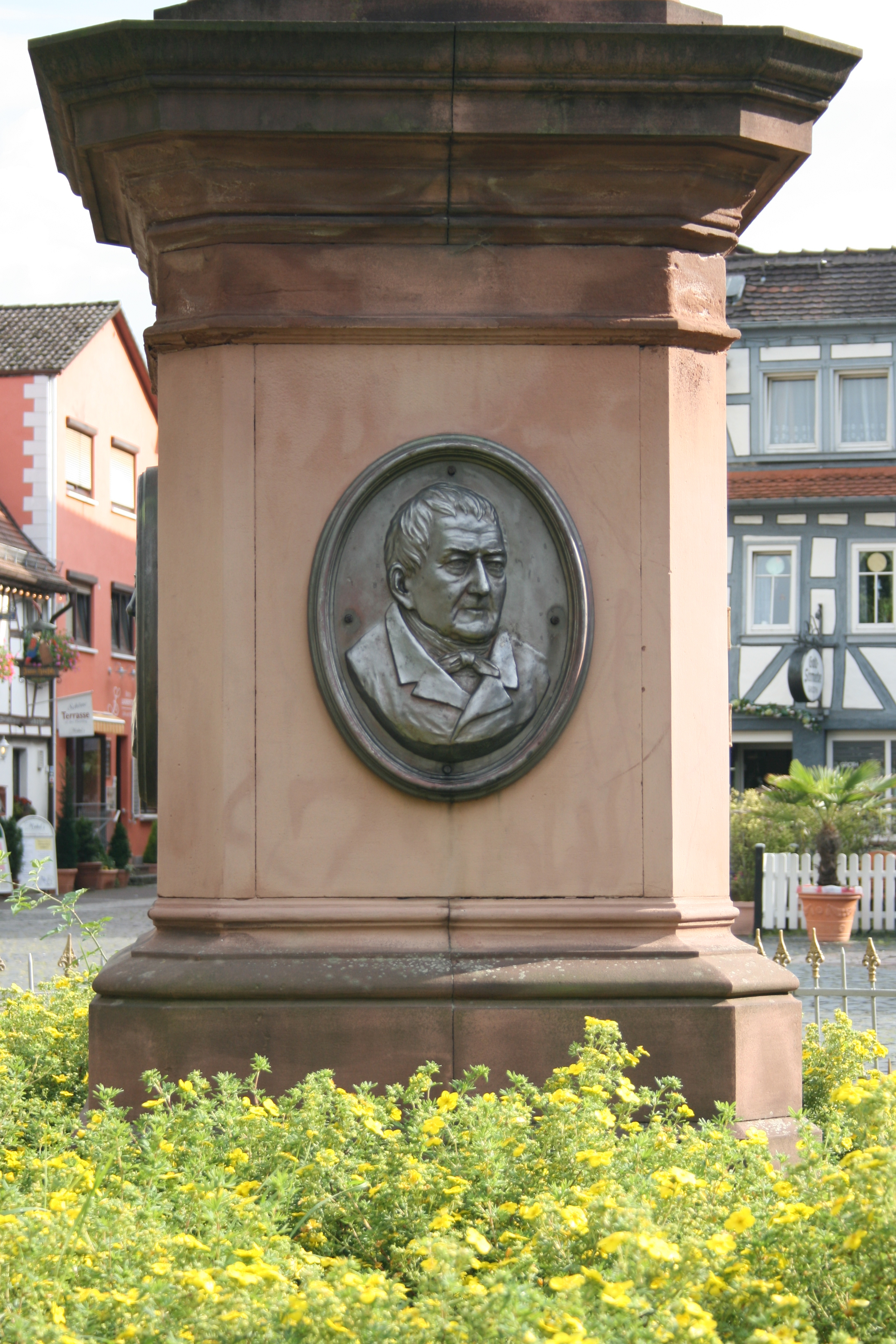 Medaillon am Sockel des Denkmals für den Grafen Franz I. zu Erbach-Erbach auf dem Marktplatz in Erbach/ Odenwald. Nordseite: Christian Kehrer.